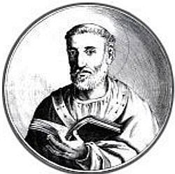 San Pedro Crisólogo